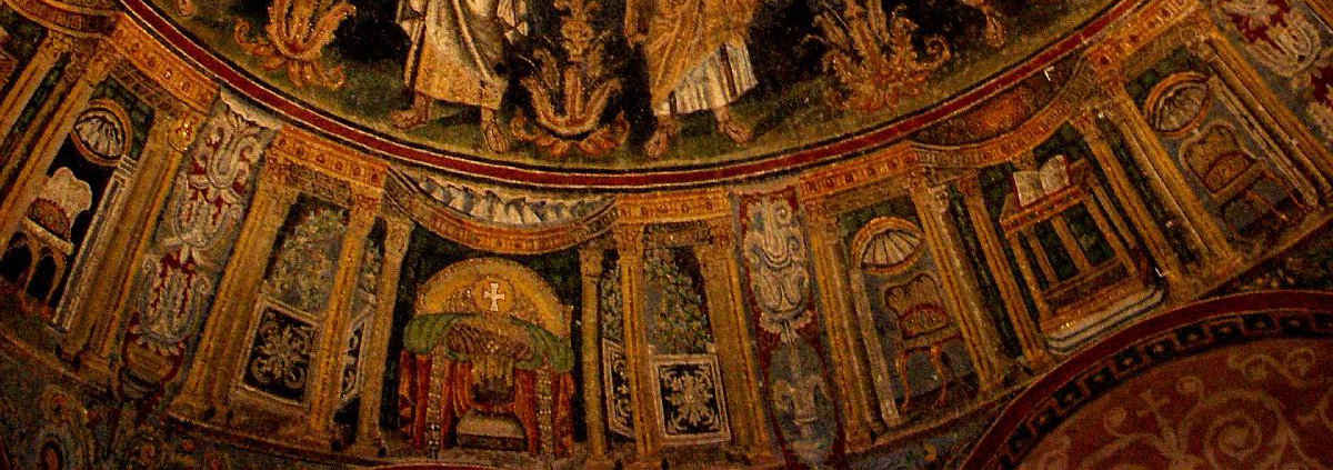 etimasia, dettaglio dei mosaici del battistero neoniano di ravenna